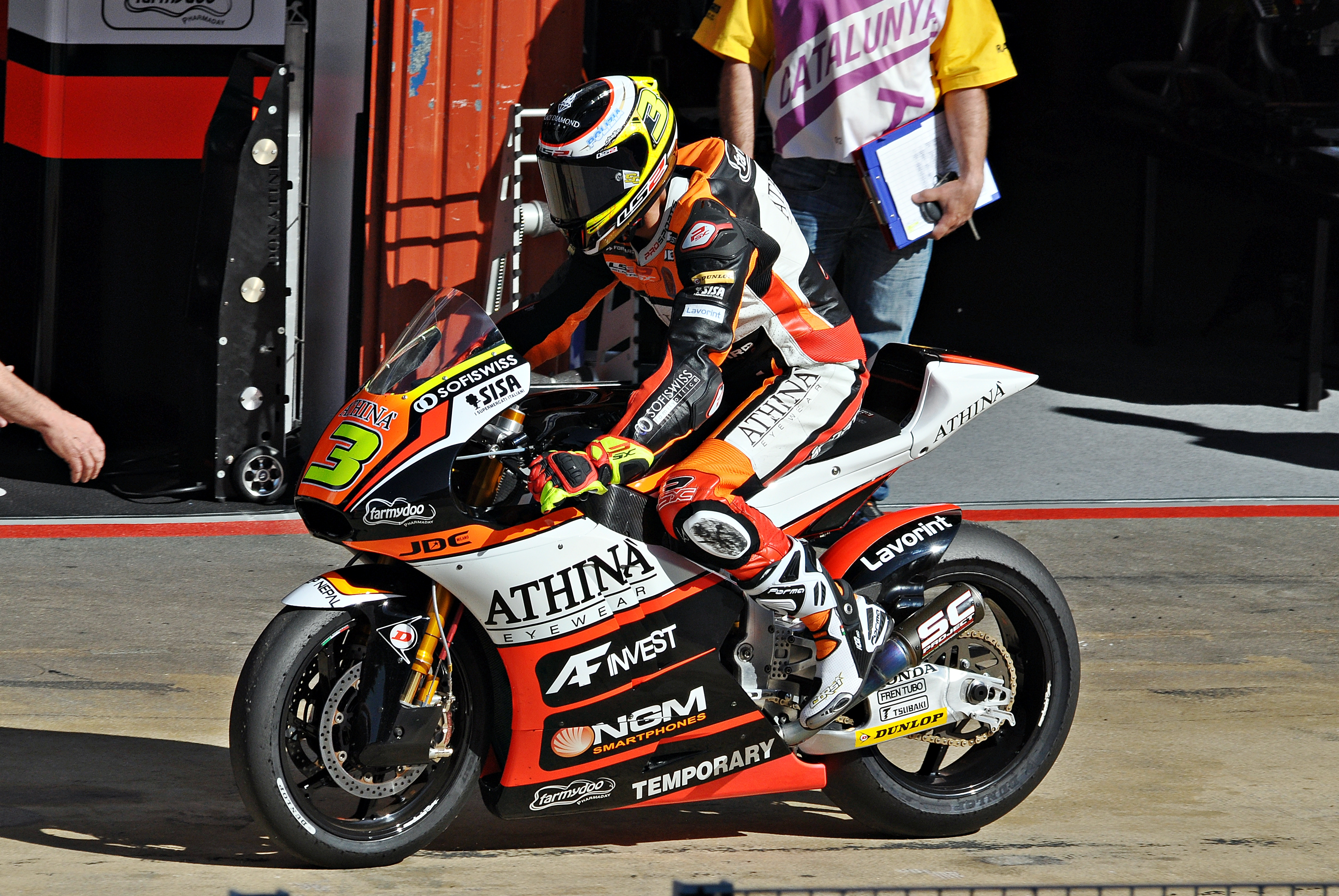 gran premio de cataluña